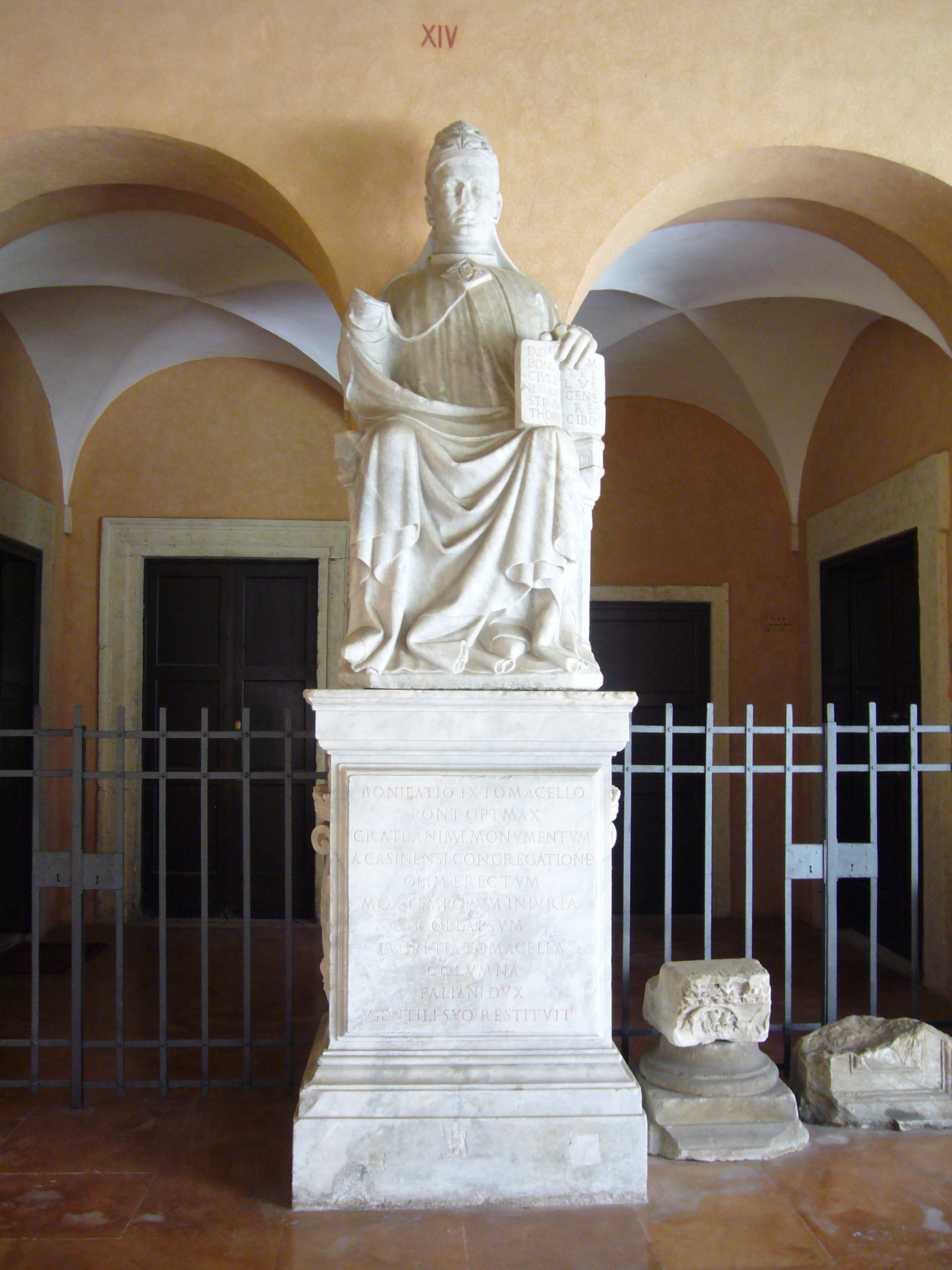 Roma, chiostro della basilica di san Paolo fuori le mura - monumento a Bonifacio IX Tomacelli